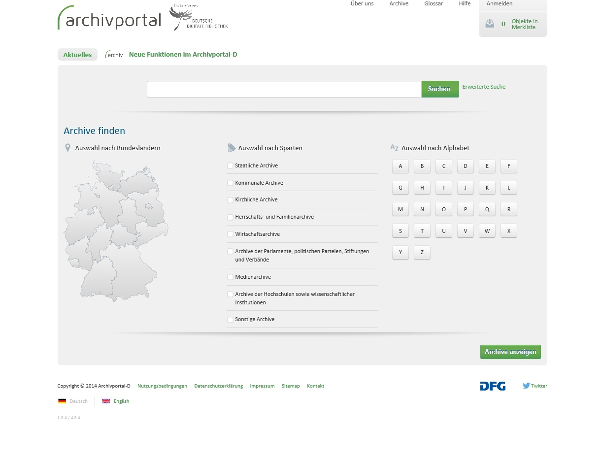 Startseite des Archivportals-D